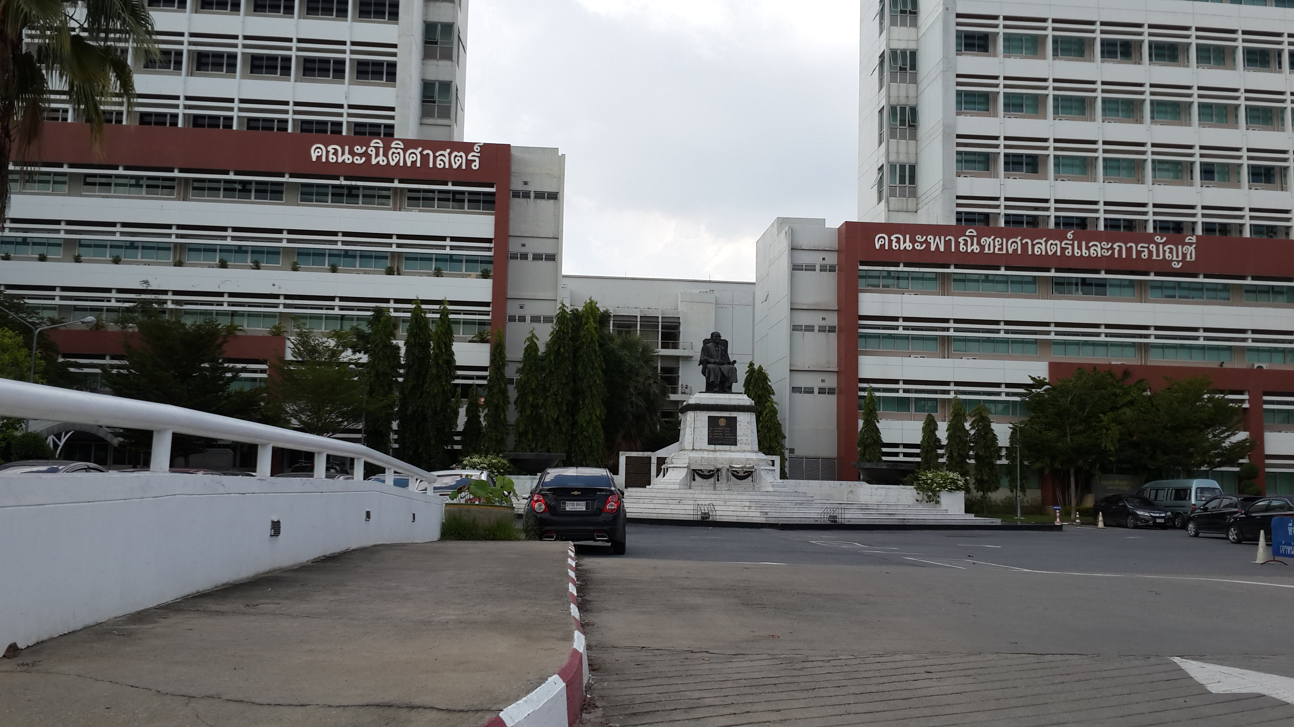 Khlong Nung, Khlong Luang District, Pathum Thani 12120, Thailand